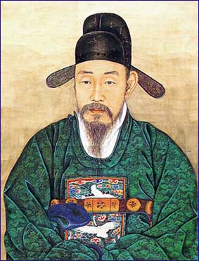 황희 영정(1414년 황희 62세 때 그린 영정)